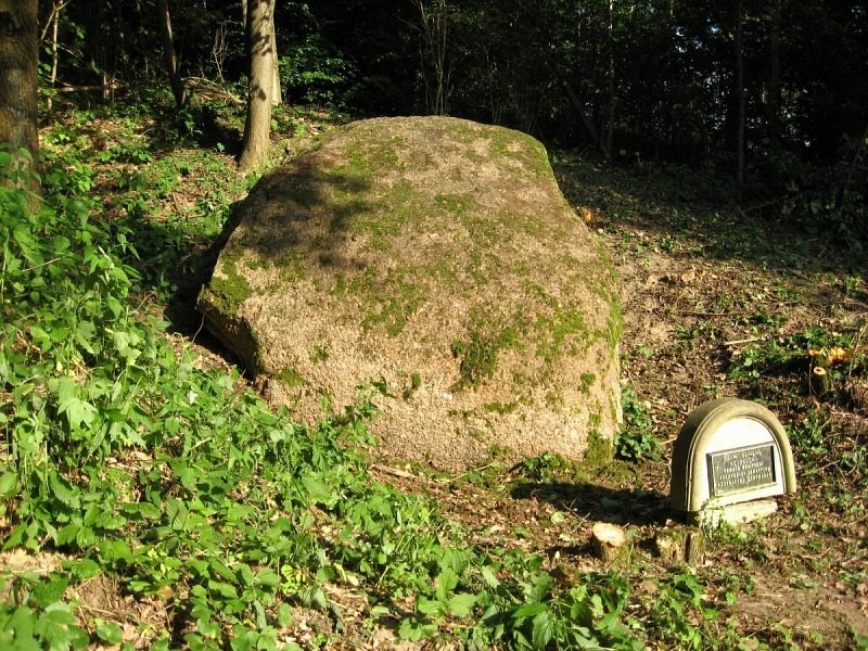 Кеўлы. Каціны камень (Кеўлаўскі вялікі камень)